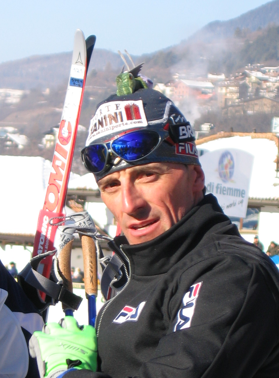 Italian skier Fulvio Valbusa at Lago di Tesero Cross-Country Ski Stadium.